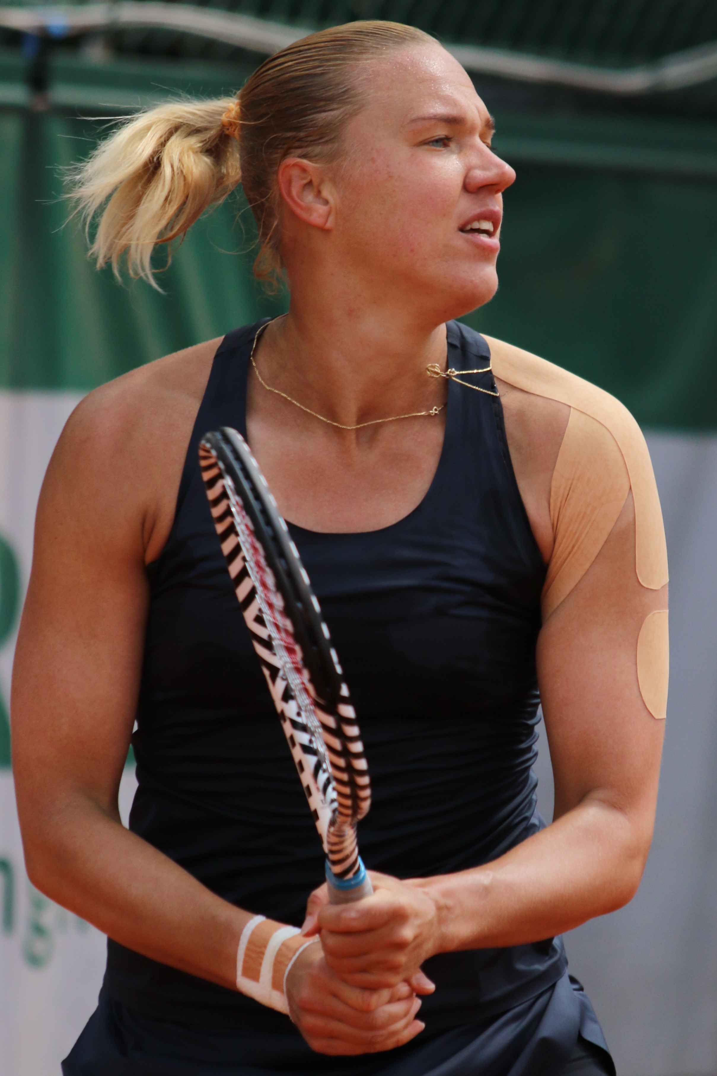 Kanepi RG19 (40)